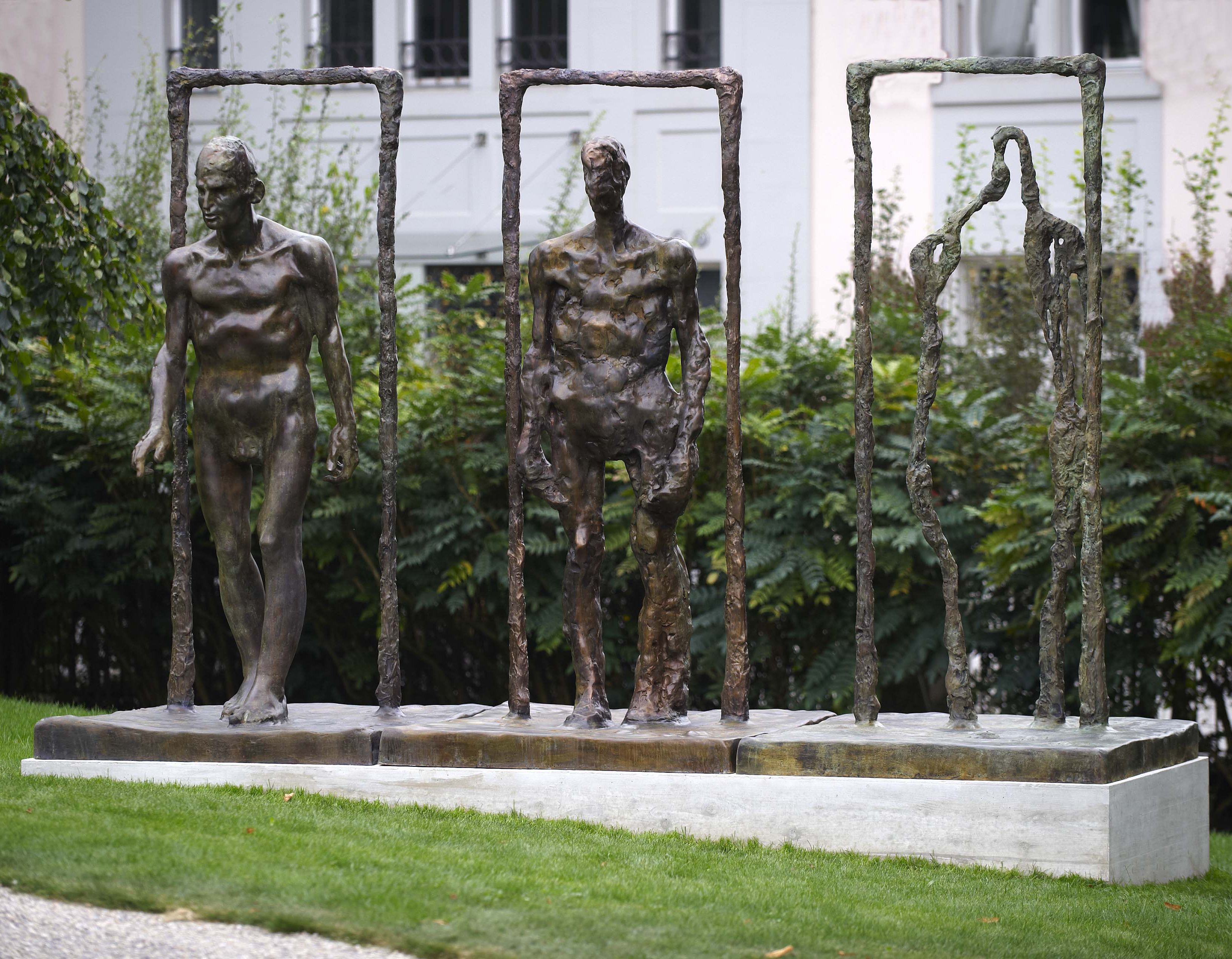 Trapasso, Park Schloss Gümligen, Bern - Christian Bolt, Kunstwerk aus Bronze